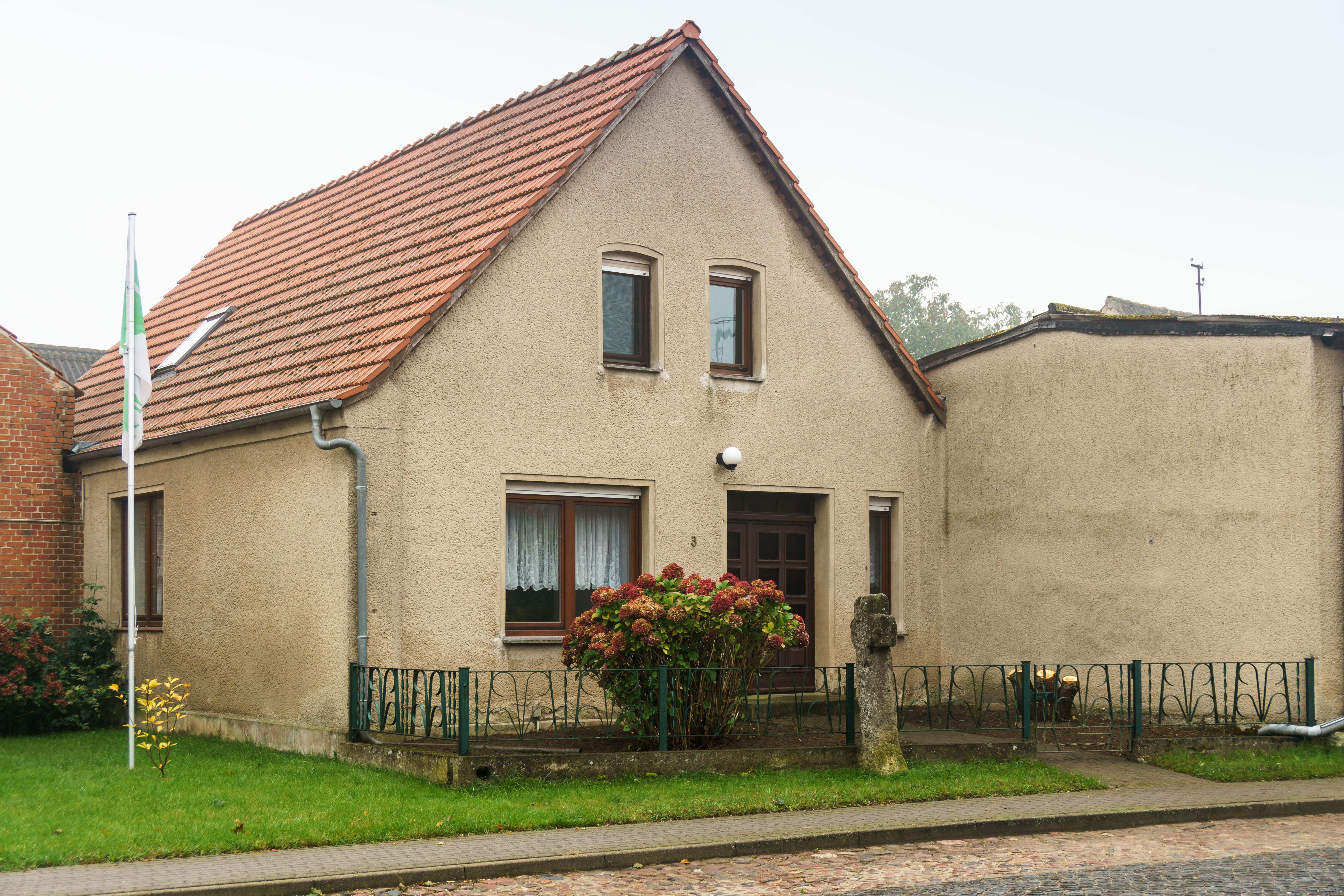 Steinkreuz vor dem Haus Hauptstraße Nr.3 in Kleinau